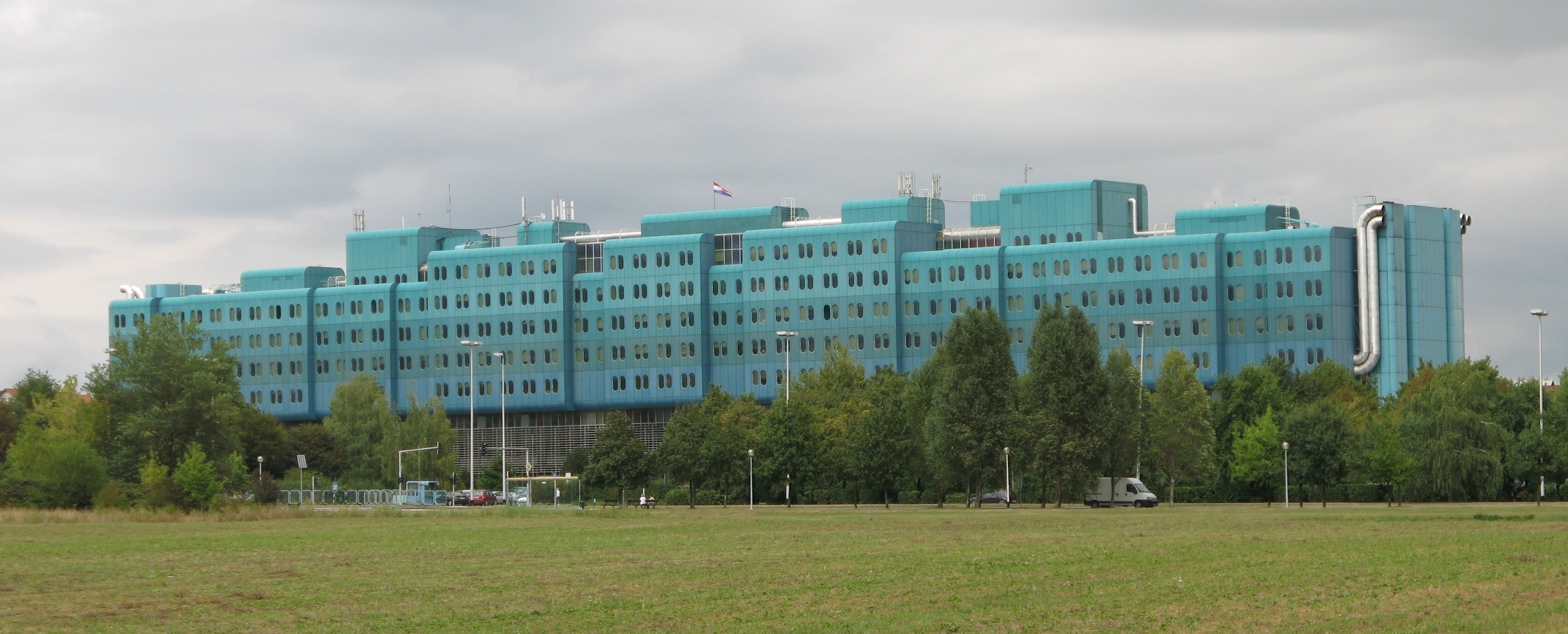 KB Dubrava u Zagrebu